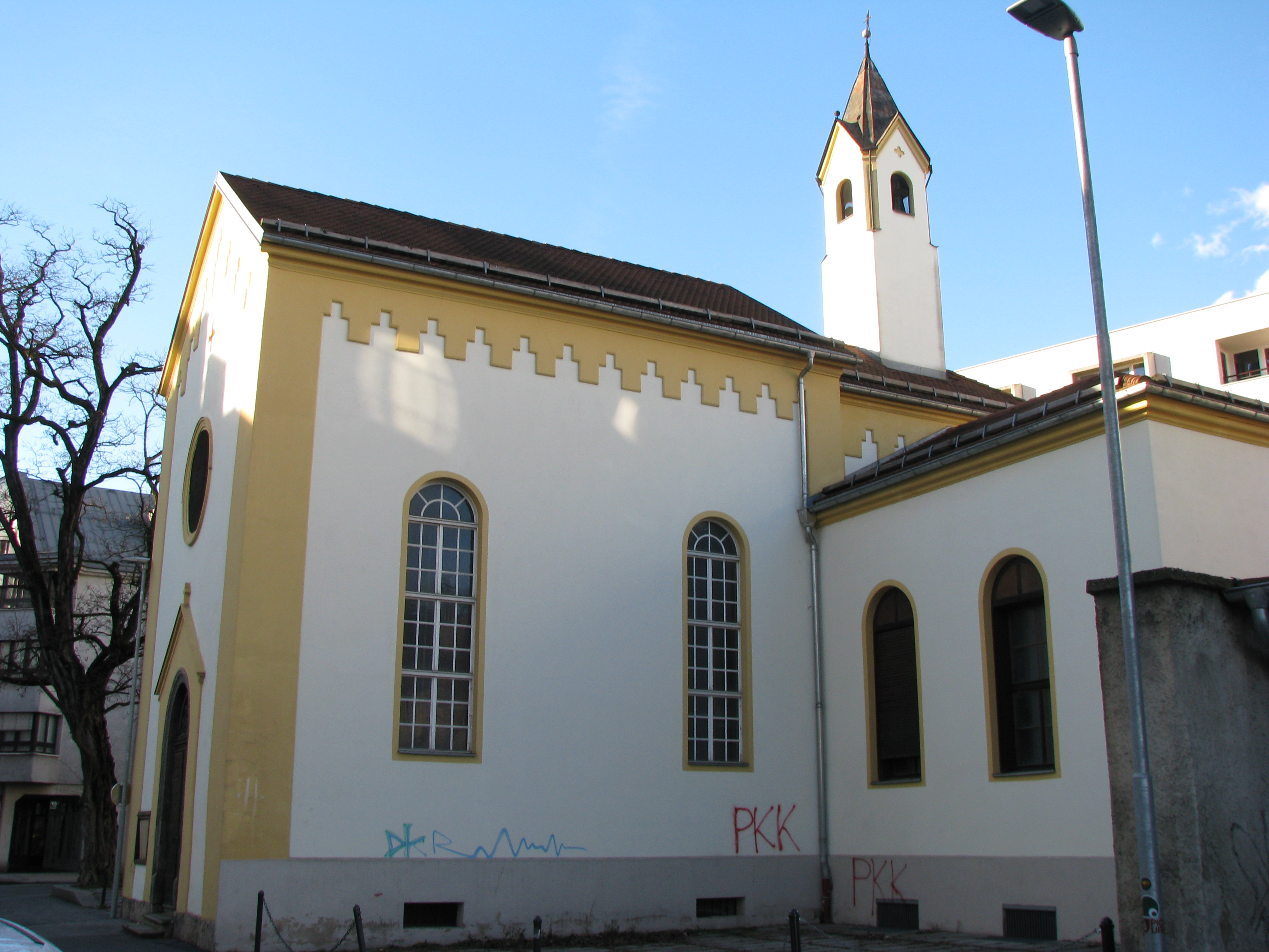 ehemalige Karmelitinnenkirche hl. Josef, Innsbruck-Wilten This media shows the remarkable cultural object in the Austrian state of Tyrol listed by the Tyrolean Art Cadastre with the ID 7806. (on tirisMaps, pdf, more images on Commons)